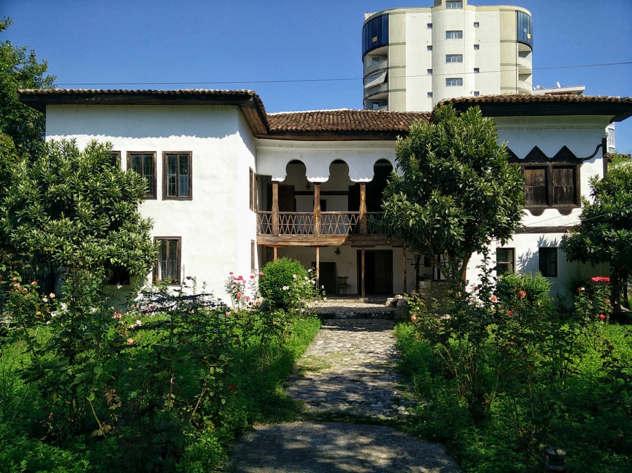 Muzeu I Qytetit (Elbasan)